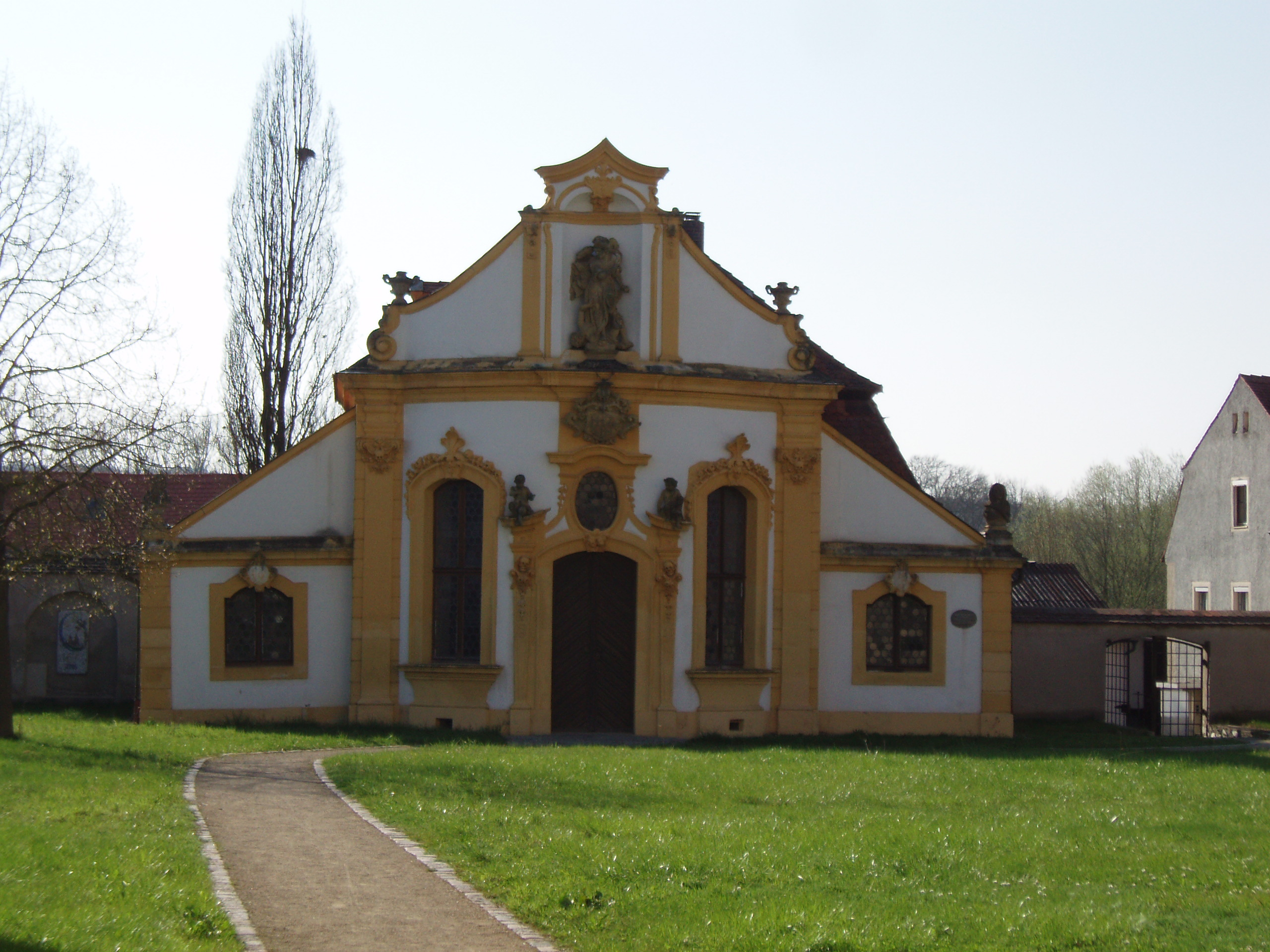 Ellingen (Landkreis Weißenburg-Gunzenhausen), Maria Hilf-Kapelle, von Hornstein'sche Gruftkapelle hinter der Stadtpfarrkirche